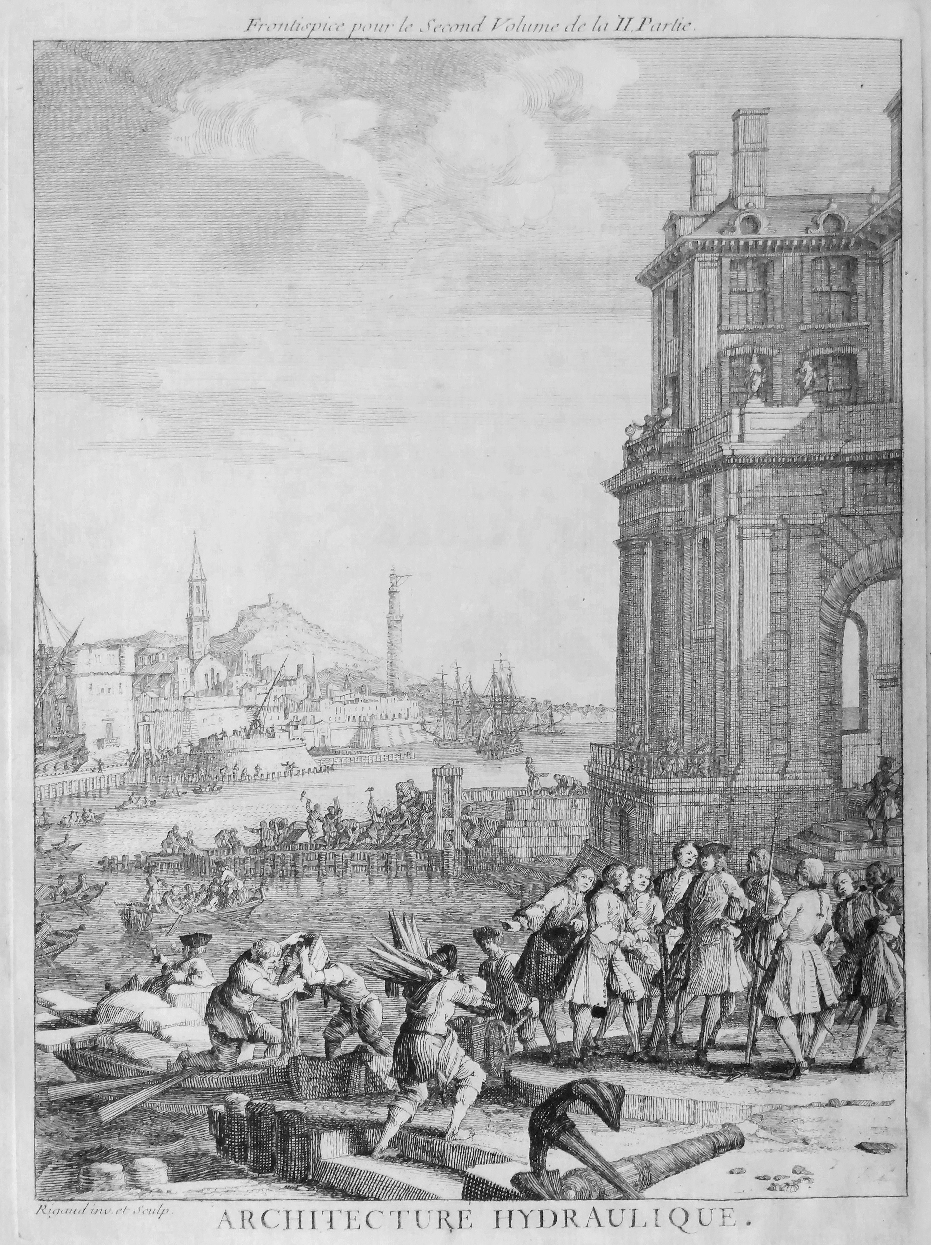 Architecture hydaulique - Seconde partie, tome second - Frontispice